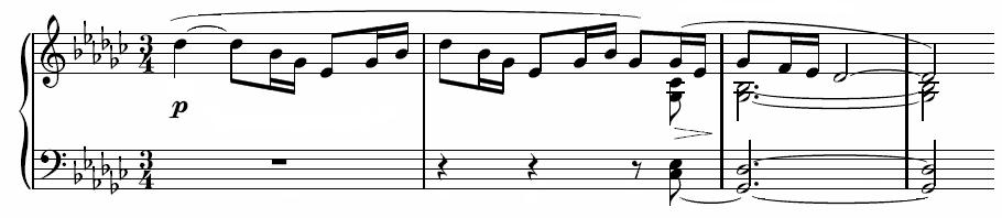 Description : Thème général du Prélude n° 8 de Claude Debussy (1862 - 1918)Auteur : Propre travail réalisé avec LilypondLicence : Domaine public (auteur décédé depuis plus de 70 ans)